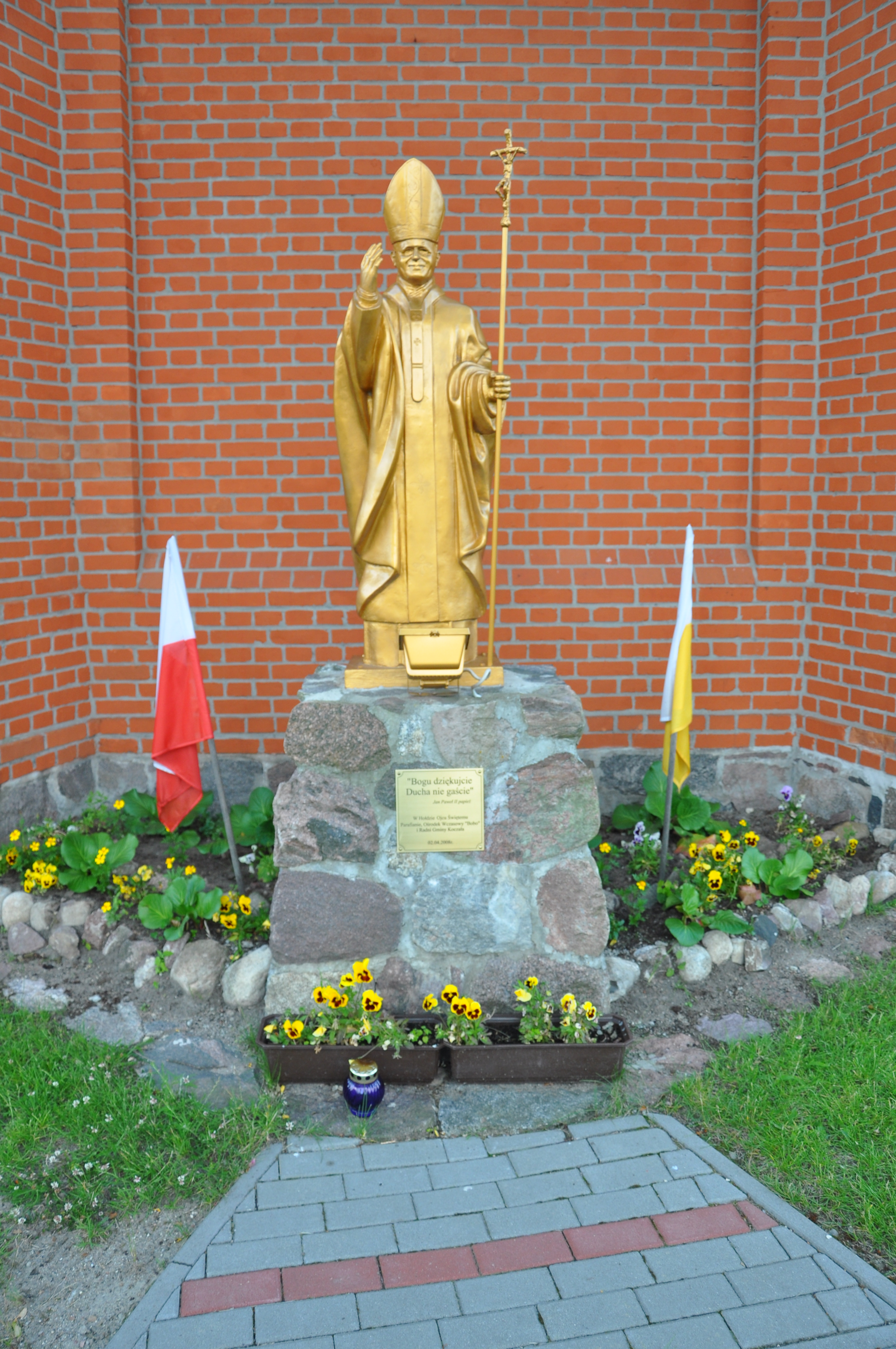 Pomnik Jana Pawła II przy Kościele NMP w Koczale W hołdzie Ojcu Świętemu Parafianie, Ośrodek Wczasowy "Bobo" i Radni Gminy Koczała 2.04.2008